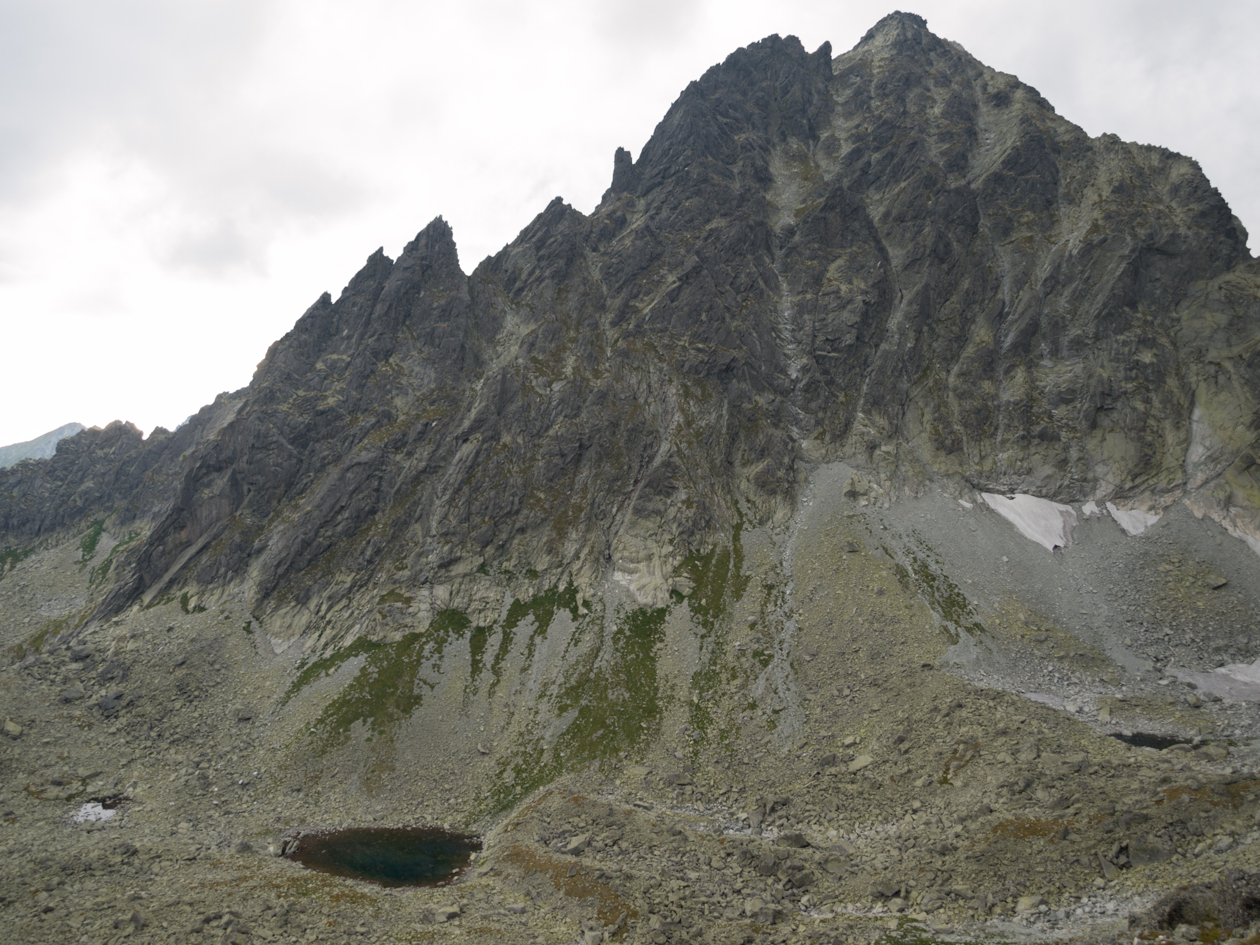 Rumanowe Stawy, Szarpane Turnie, Smoczy Szczyt, Wysoka